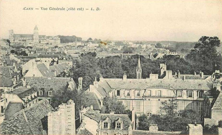 vue du quartier Saint-Jean de Caen depuis la tour de l’église éponyme ; au premier plan l’hôtel de Blangy.